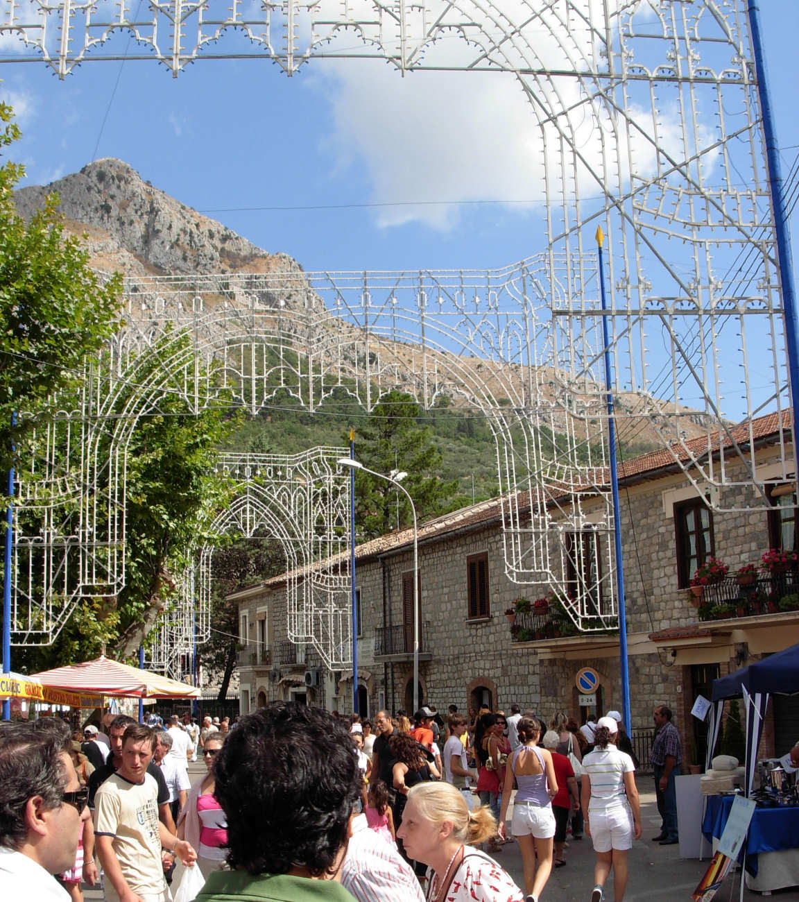 Veduta del Centro storico di Foglianise (BN), Italia